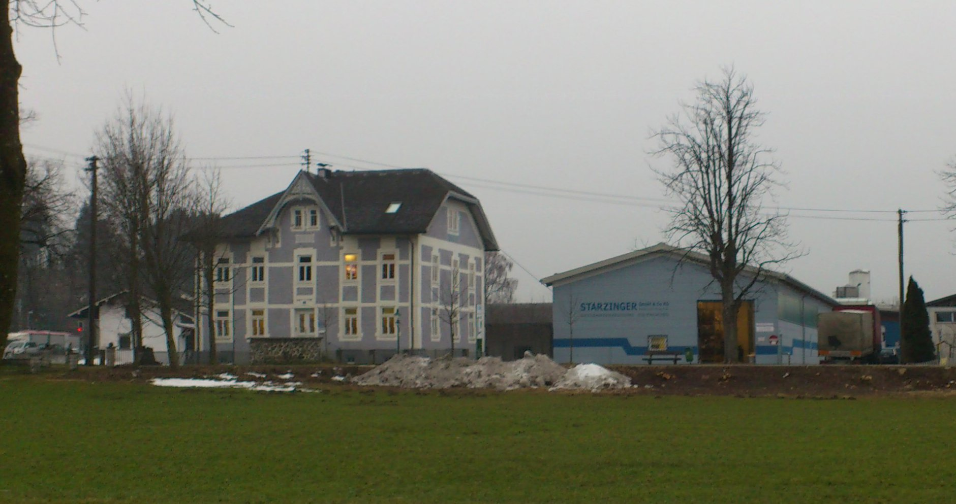 Blick auf den Starzinger-Unternehmenssitz in Frankenmarkt